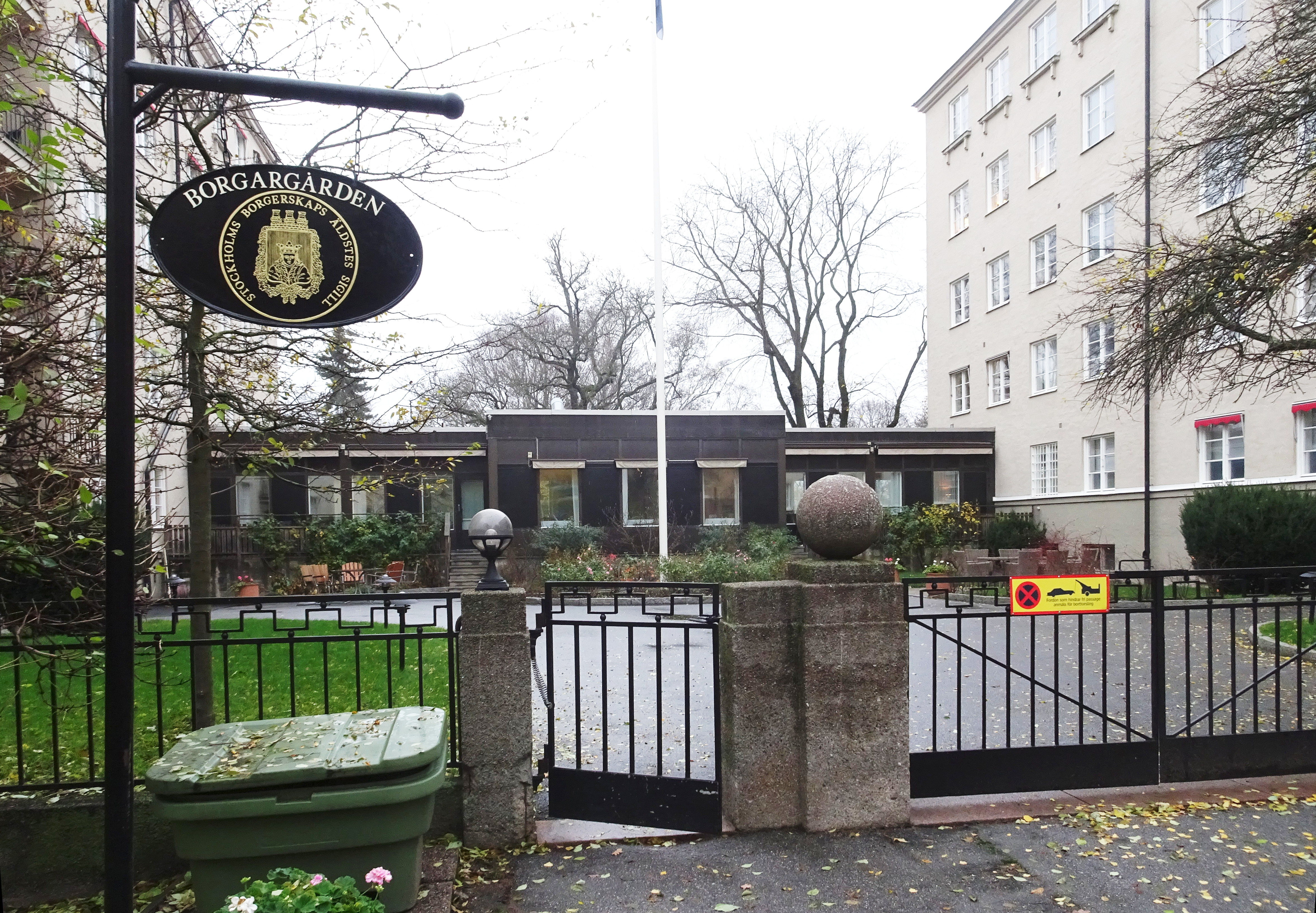 Borgargården Rålambsvägen 66